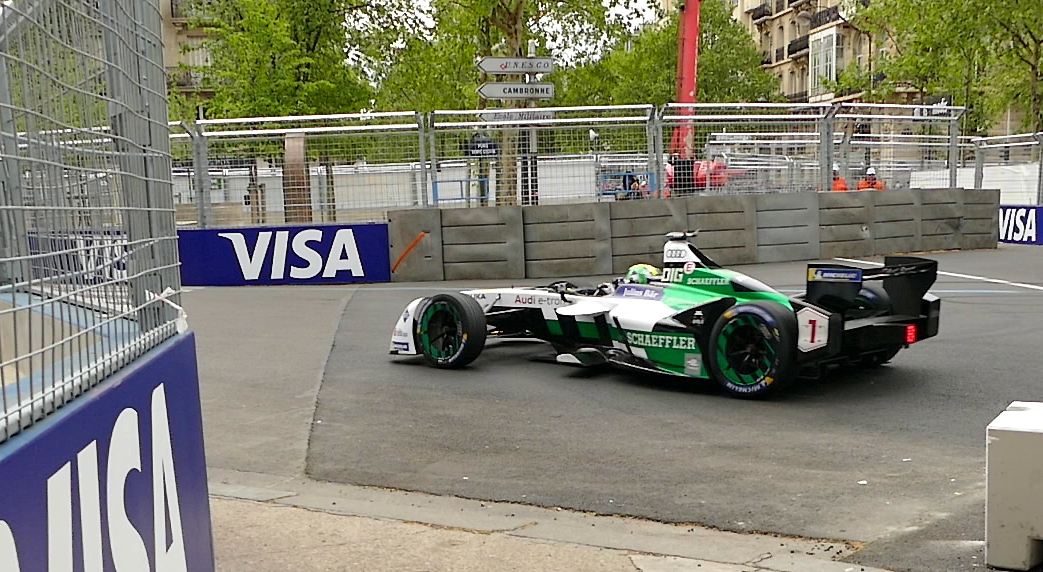 Paris ePrix 2018 la F1 Audi n°1 en course. (Extrait vidéo)